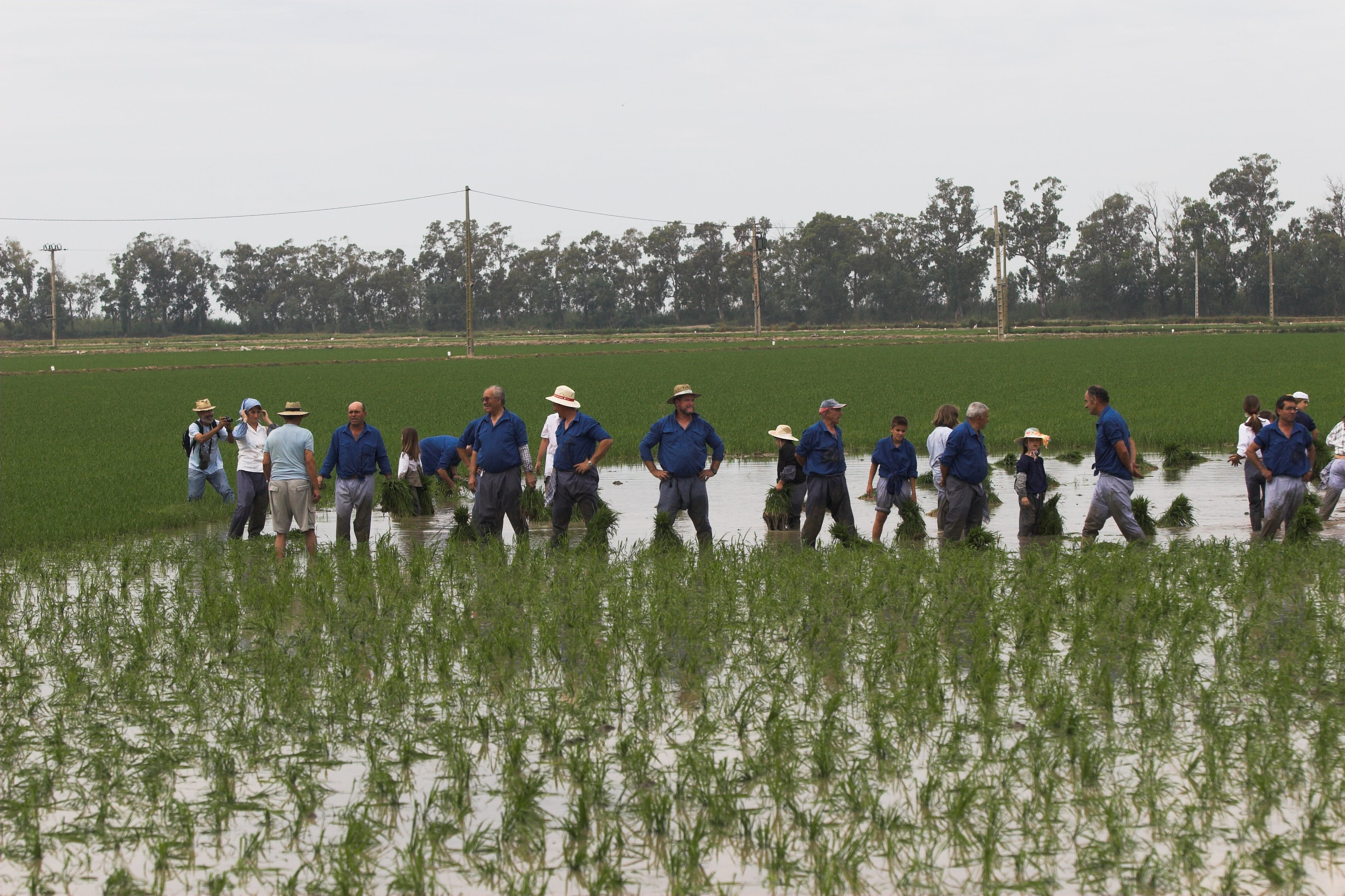 Delta de l'Ebre This is a a photo of a natural area in Catalonia, Spain, with id: ES510102